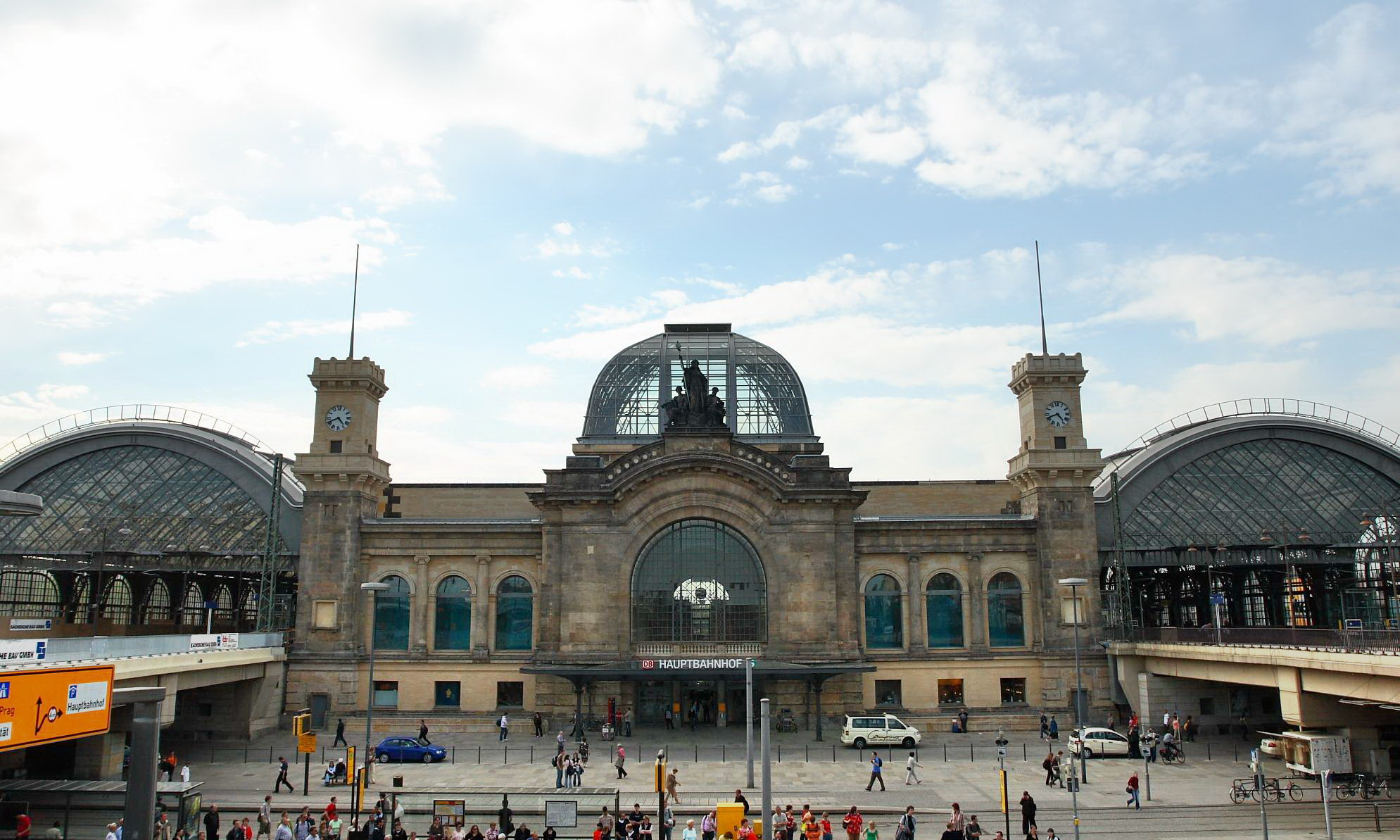 Dresden Mainstation